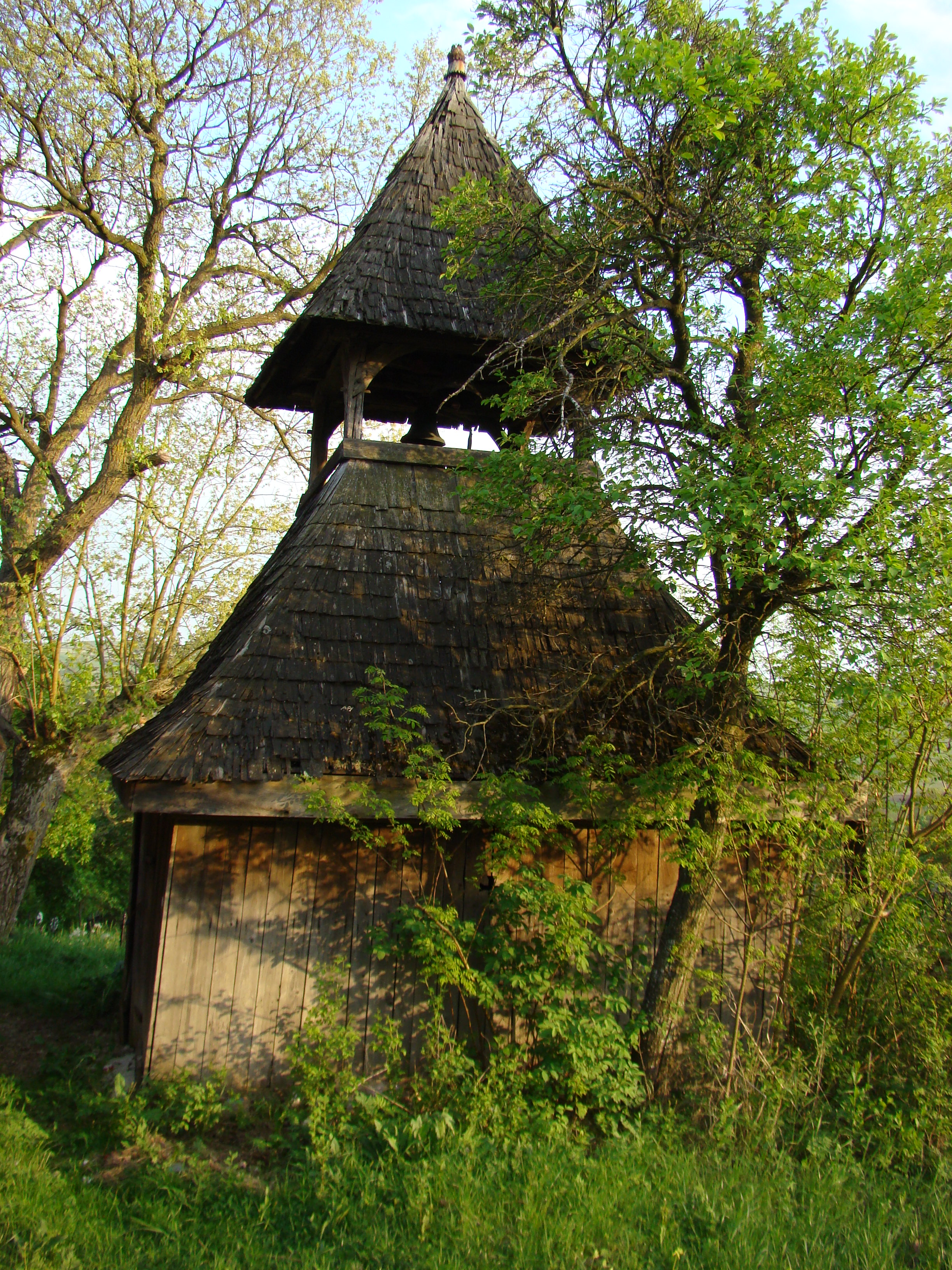 Biserica de lemn din Turdaș